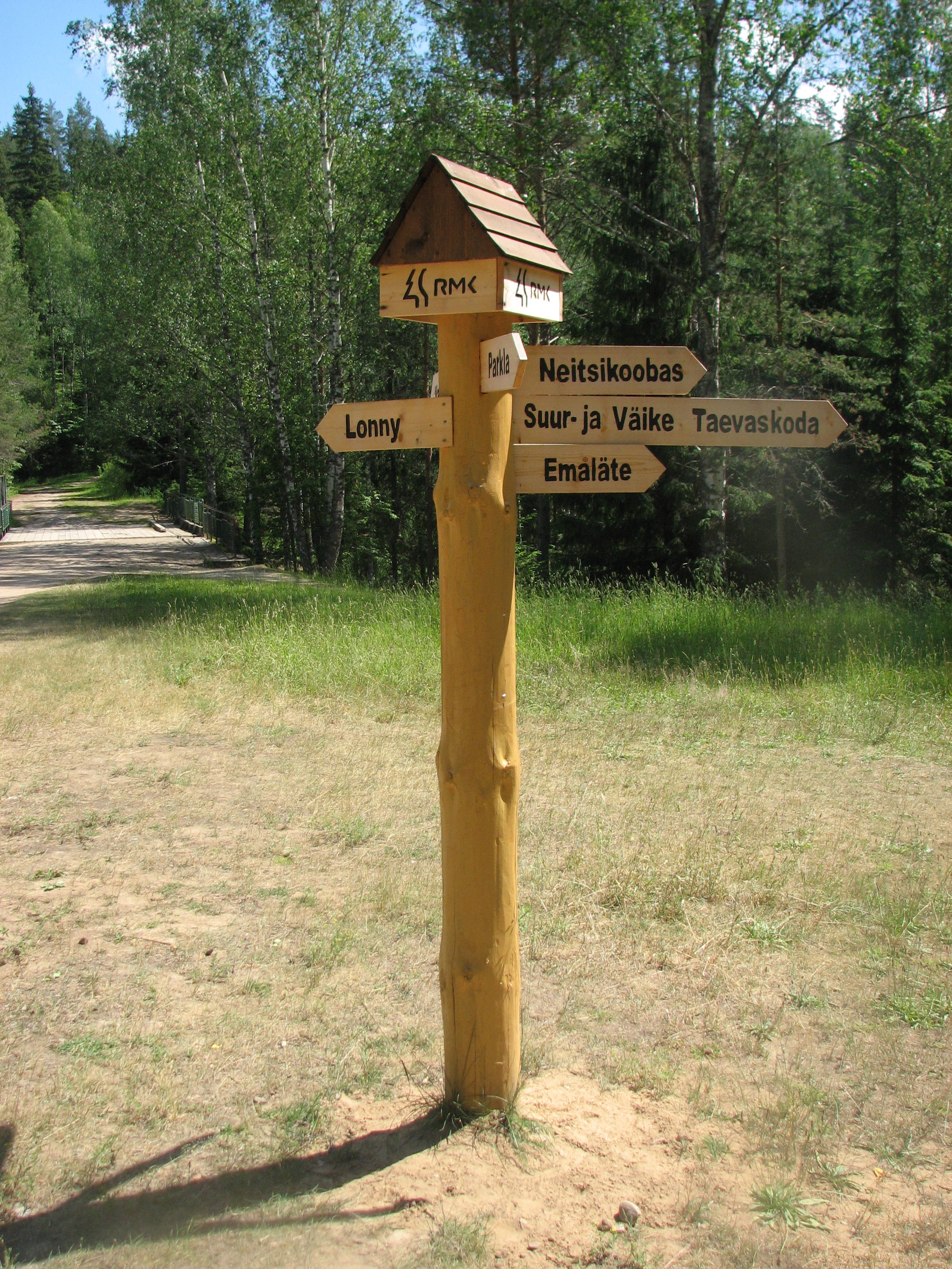 RMK viit Taevaskojas